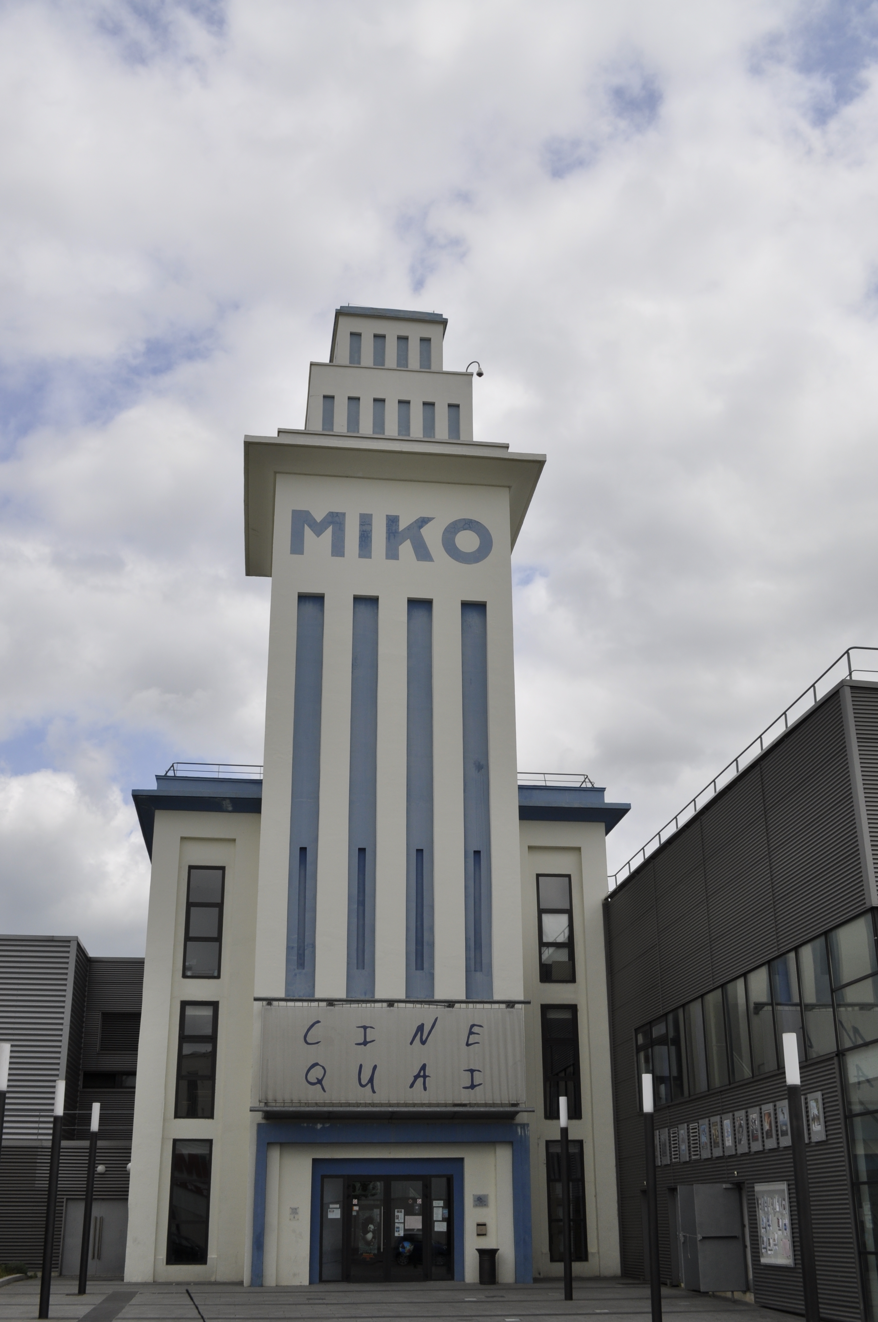 Saint Dizier. Multiplex Ciné-quai (tour des entreprises Miko, accueillant un musée).